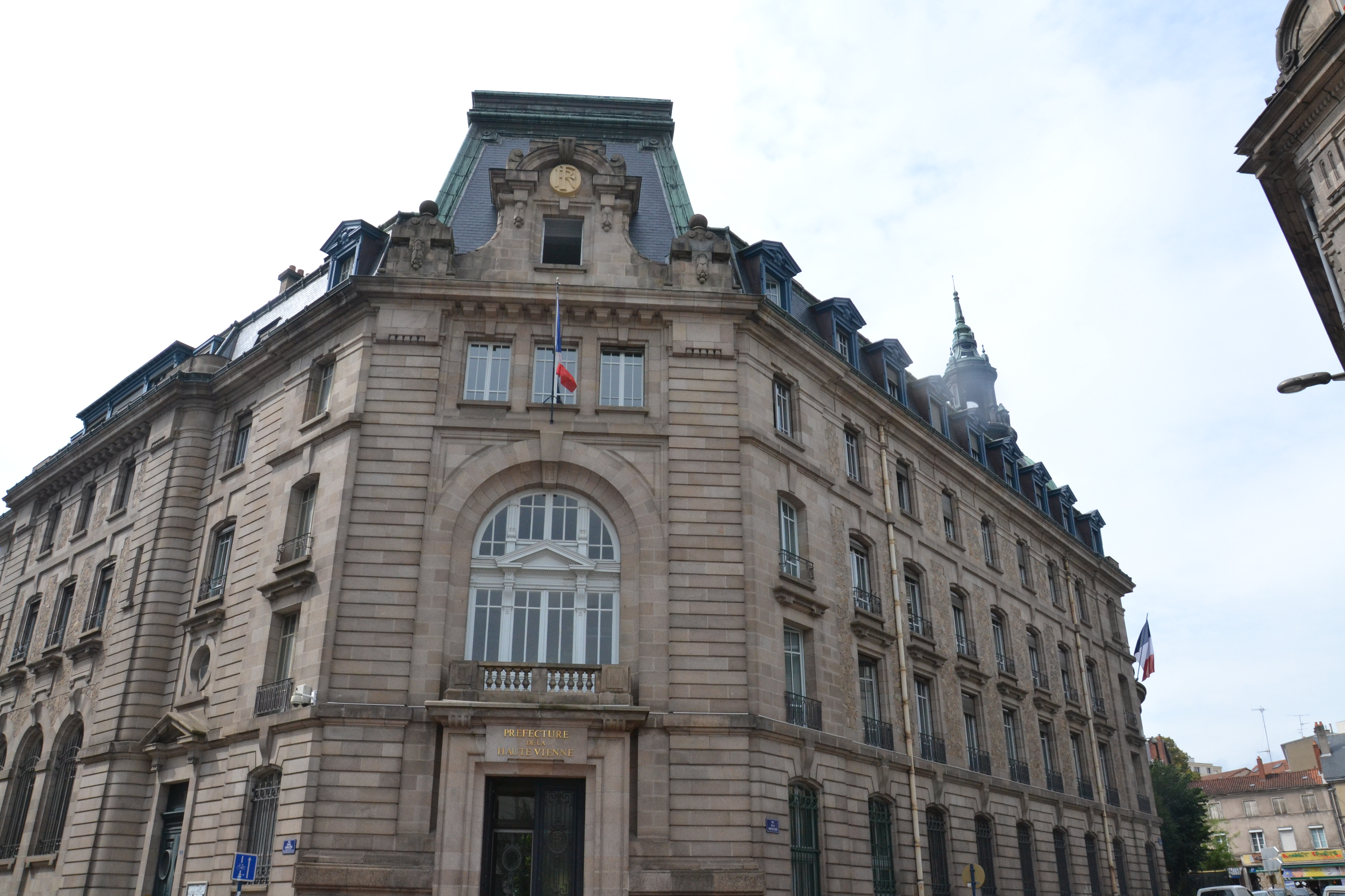 Hôtel de la Préfecture de la Haute-Vienne - Limoges (MH)